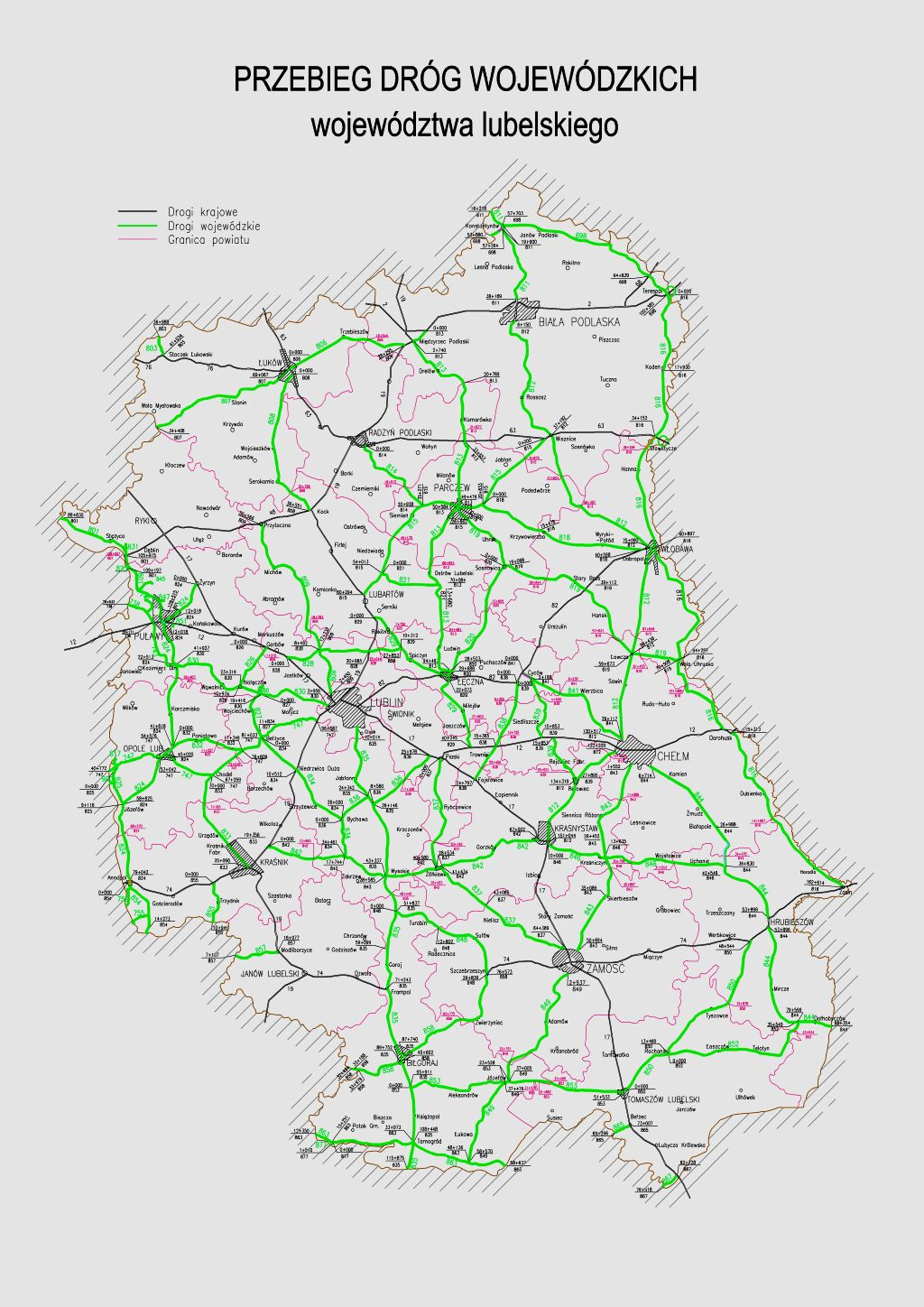 mapa dróg wojewódzkich w województwie lubelskim